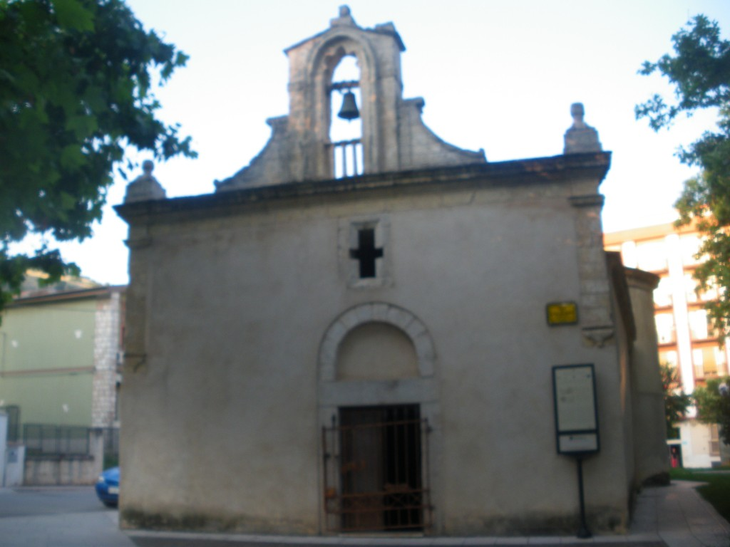 San Giovanni Rotondo: la Chiesa di San Giovanni Battista detta "La Rotonda".